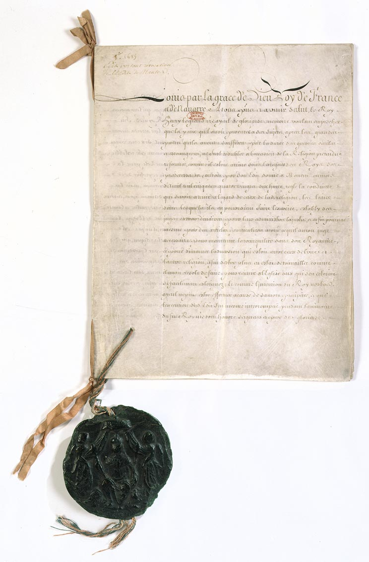 Édit de Louis XIV portant révocation de l'Édit de Nantes, première page